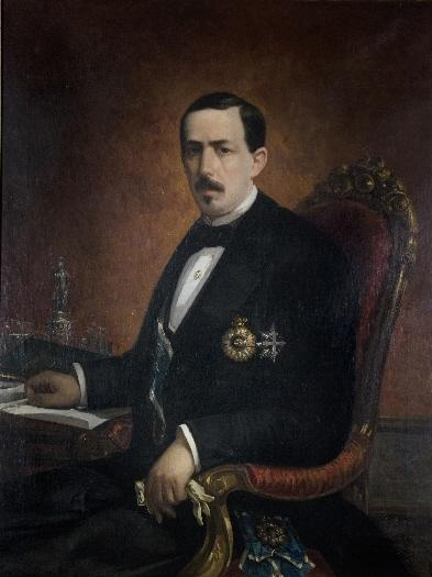 Retrato del politico español Manuel Ruiz Zorrilla (1833-1895). Fue diputado a Cortes y posteriormente ministro de Fomento y también de Gracia y Justicia durante el Gobierno Provisional establecido en España tras el triunfo de la Revolución Gloriosa en 1868. Y también fue Presidente del Consejo de Ministros en dos ocasiones durante el efímero reinado de Amadeo I. Además, Manuel Ruiz Zorrilla llegó a ser Gran Maestre del Gran Oriente de España entre 1870 y 1874 y tras la Restauración borbónica en España fue obligado a exiliarse en febrero de 1875, pasando a defender a partir de entonces la opción republicana y a ser uno de los líderes del republicanismo español. En 1895 volvió a España y murió en Burgos el día 13 de junio de ese mismo año.